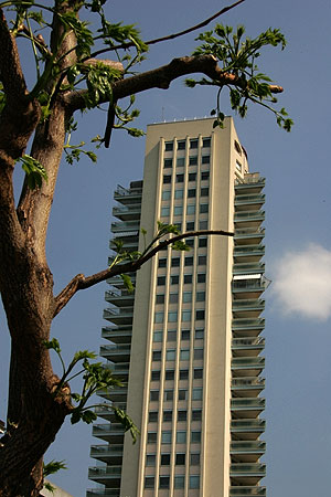 Das markante Hochhaus in Montreux